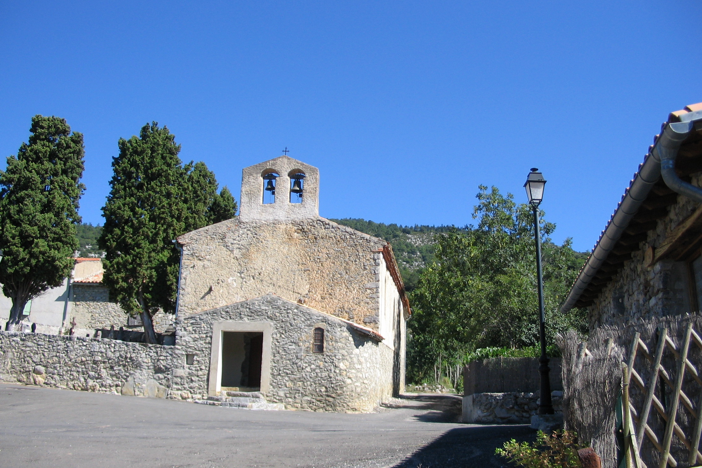 Eglise du village de Quirbajou